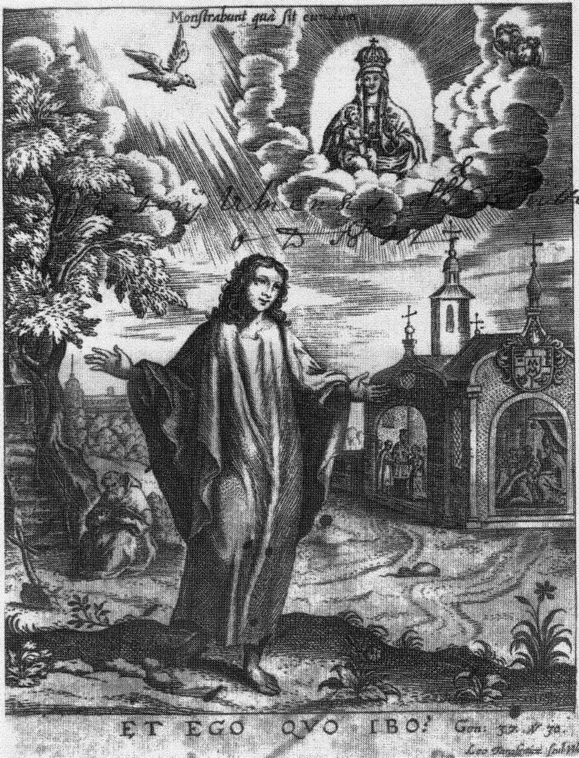 Франтыспіс кнігі М. Буйноўскага «Рацыянальныя асновы выбару»